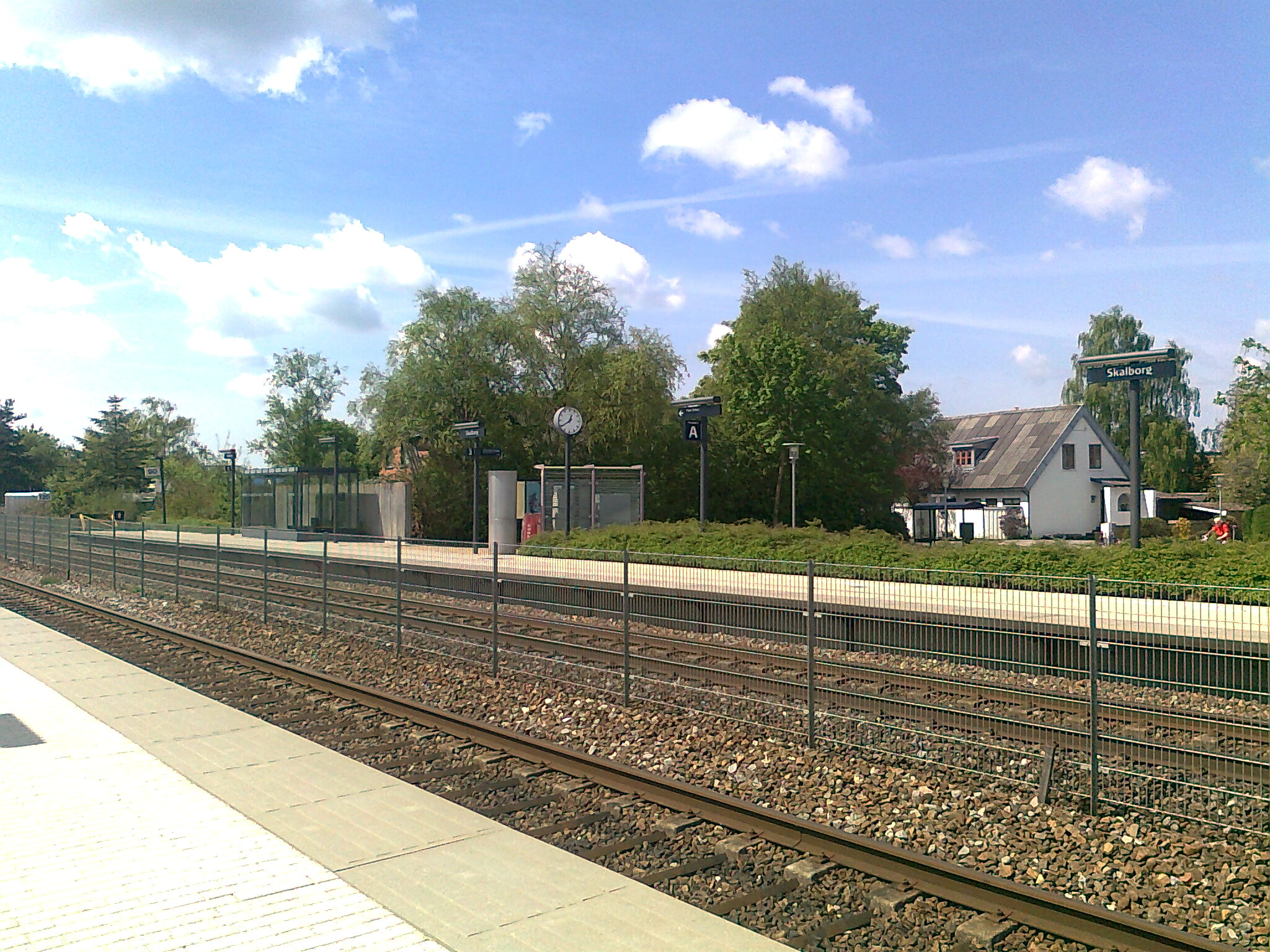 Skalborg Station, 9200 Aalborg SV, Danmark